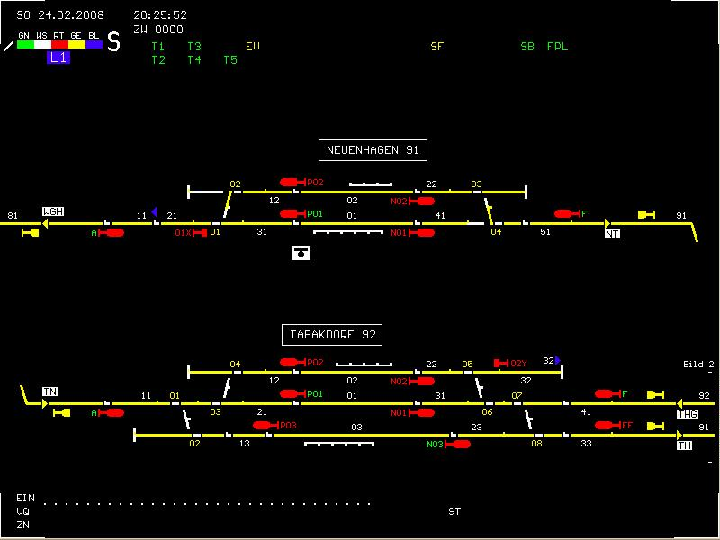 Stellwerkanzeige ESTW L 90 von Alcatel